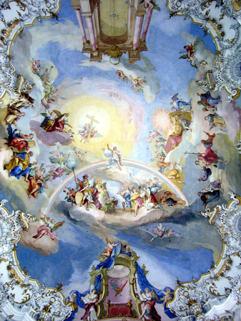 Kuppelfresko der Wieskirche